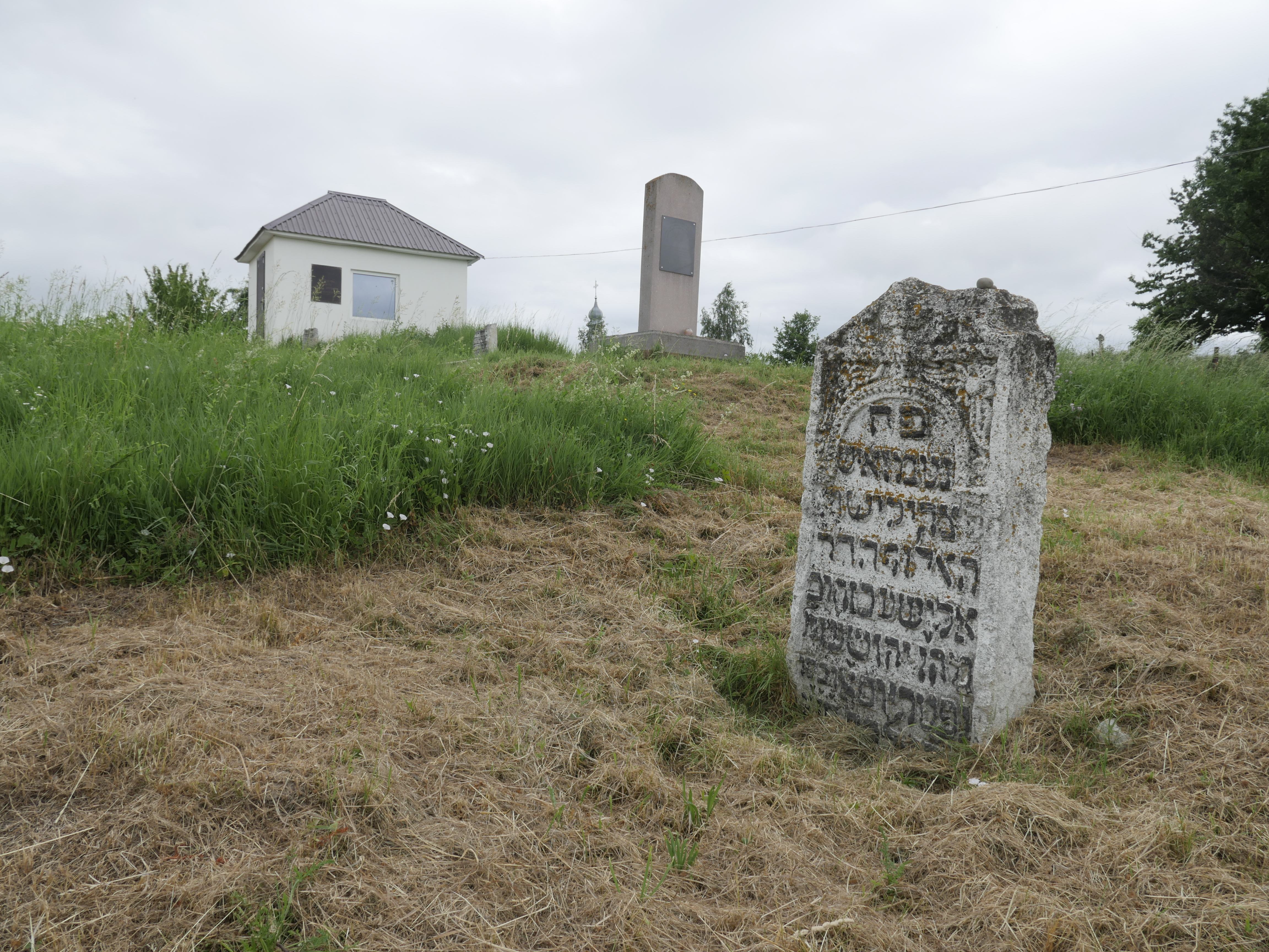 Ohel i tablica nagrobna na starym cmentarzu żydowskim, Rohatyn, Ukraina